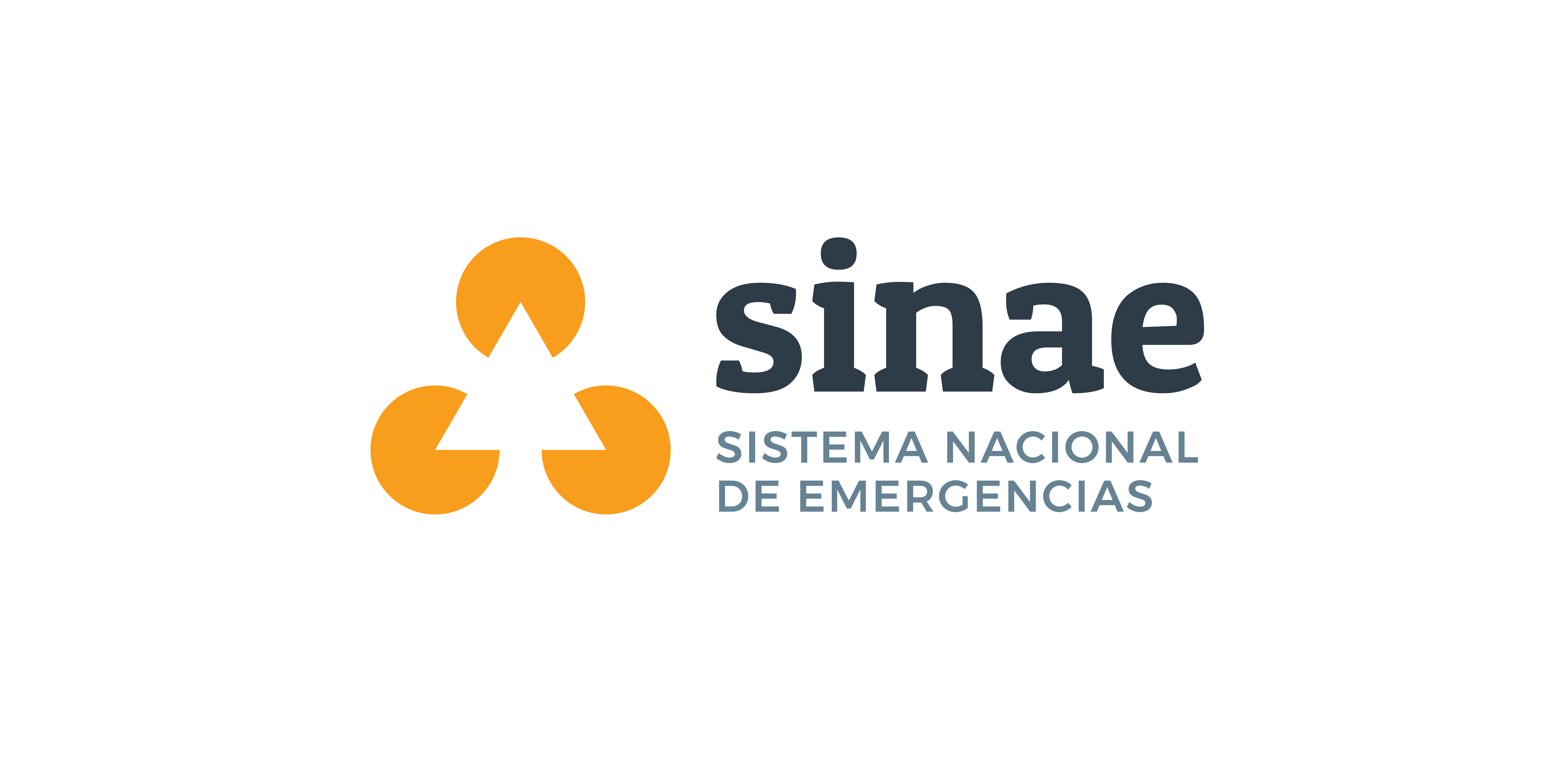 Isologotipo del Sistema Nacional de Emergencias de la República Oriental del Uruguay